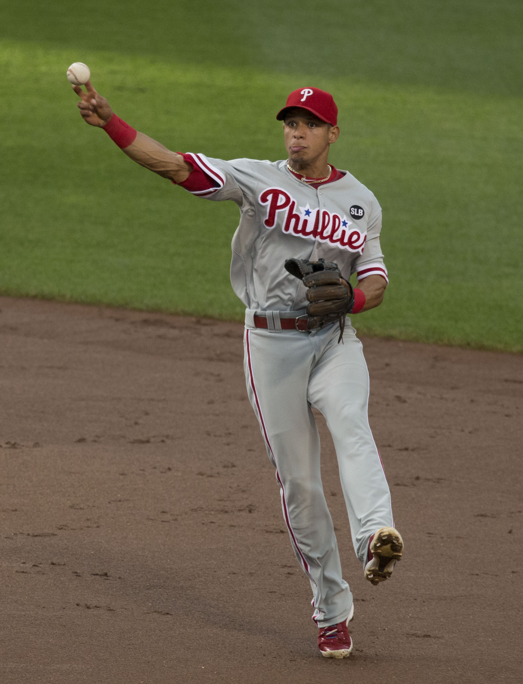 Phillies at Orioles 6/15/15